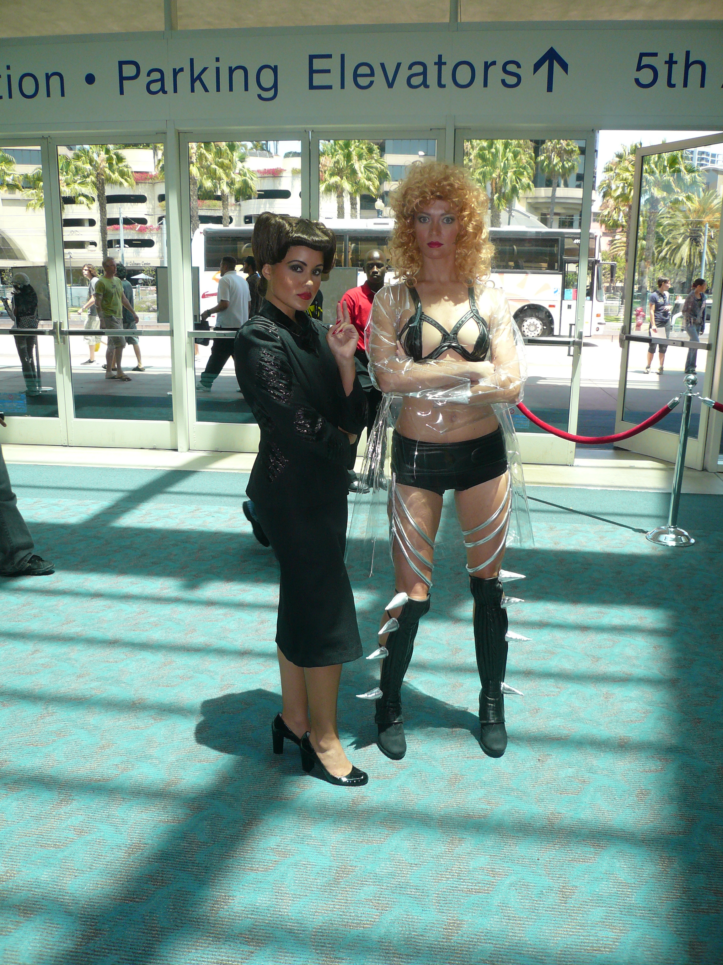 Cosplay de Rachael y Zhora de Blade Runner en la Comic-Con de San Diego (2007).